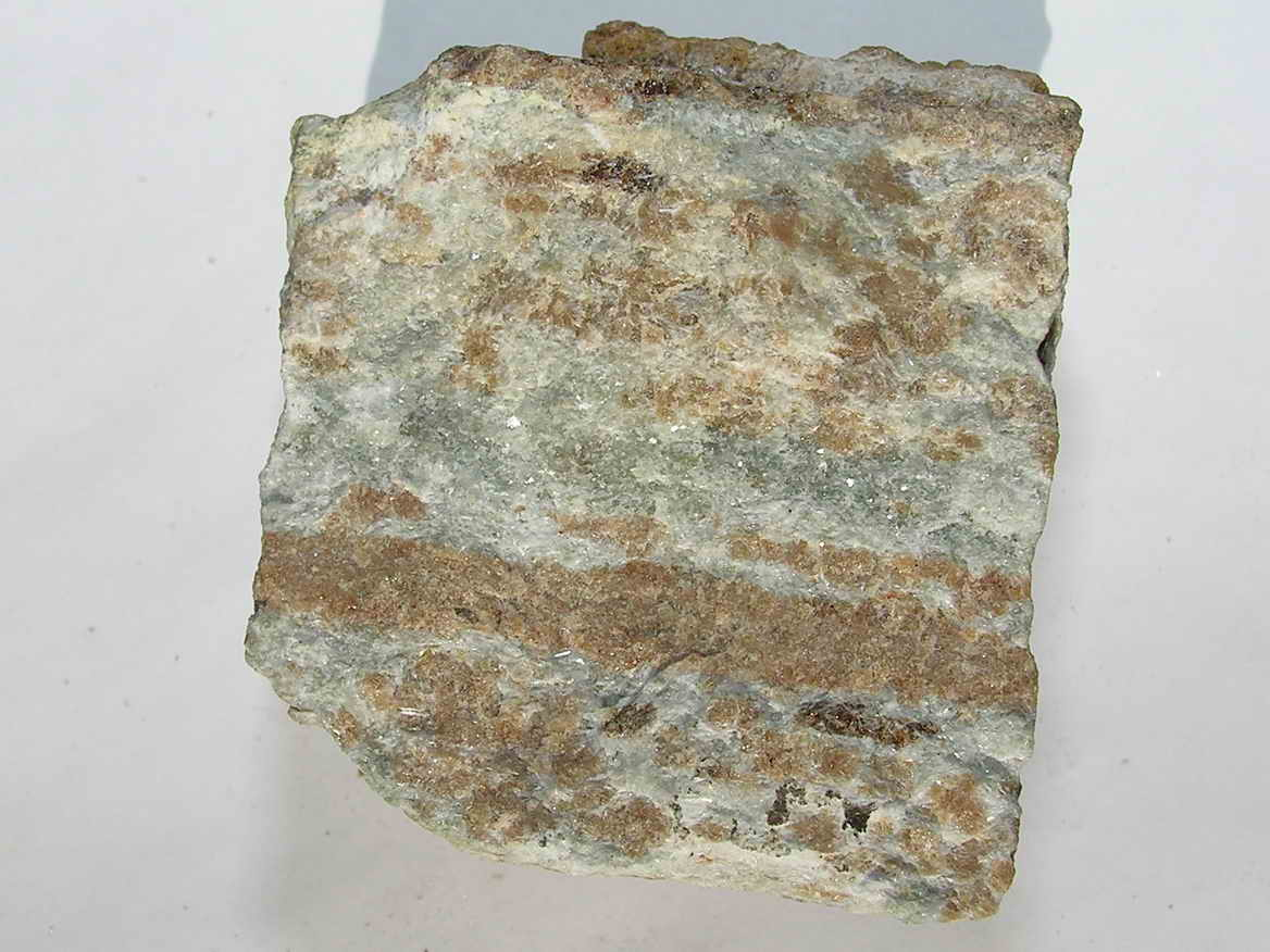 Wollastonita